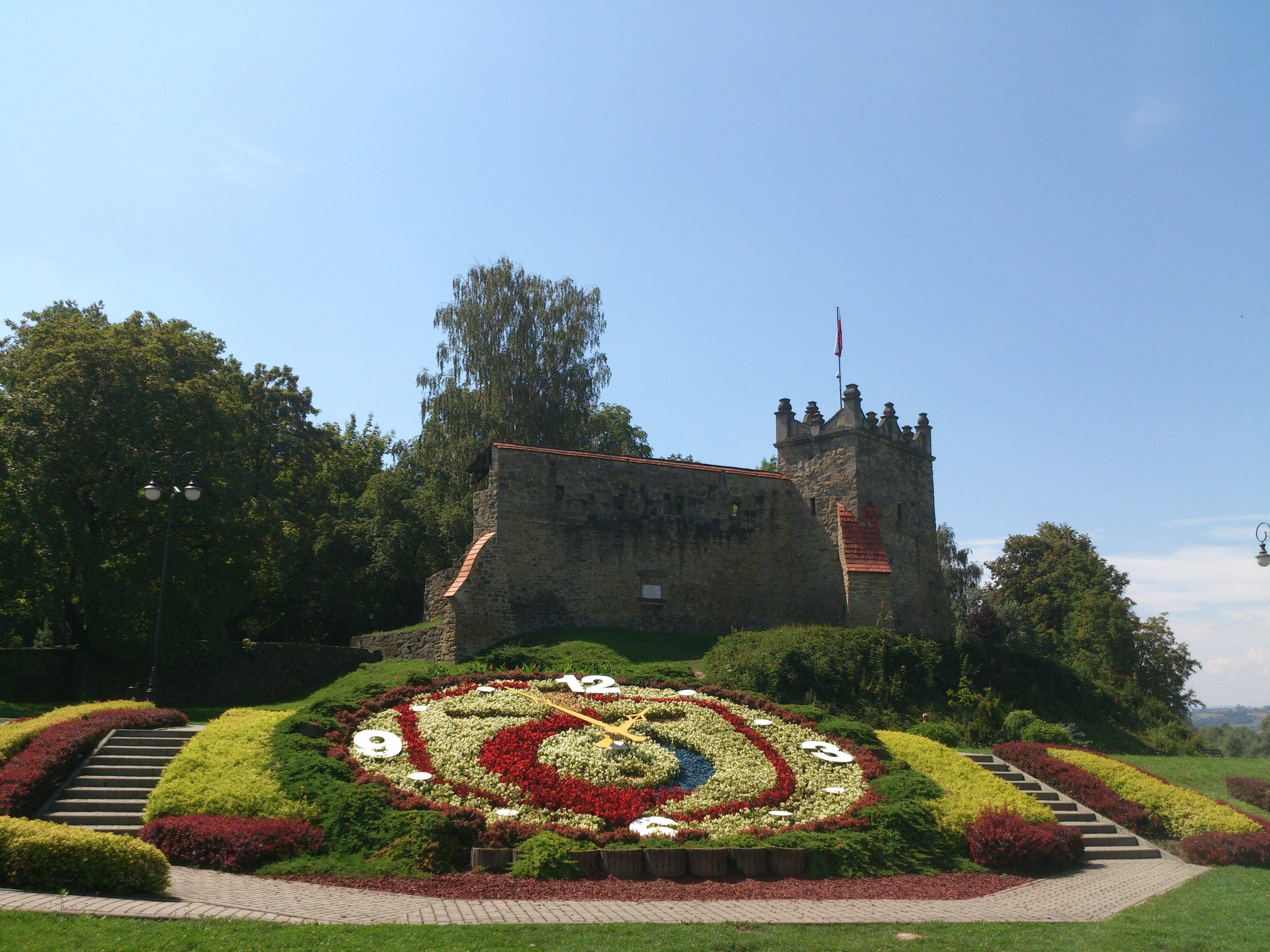 폴란드에 노비 송치에 있는 성터이다.